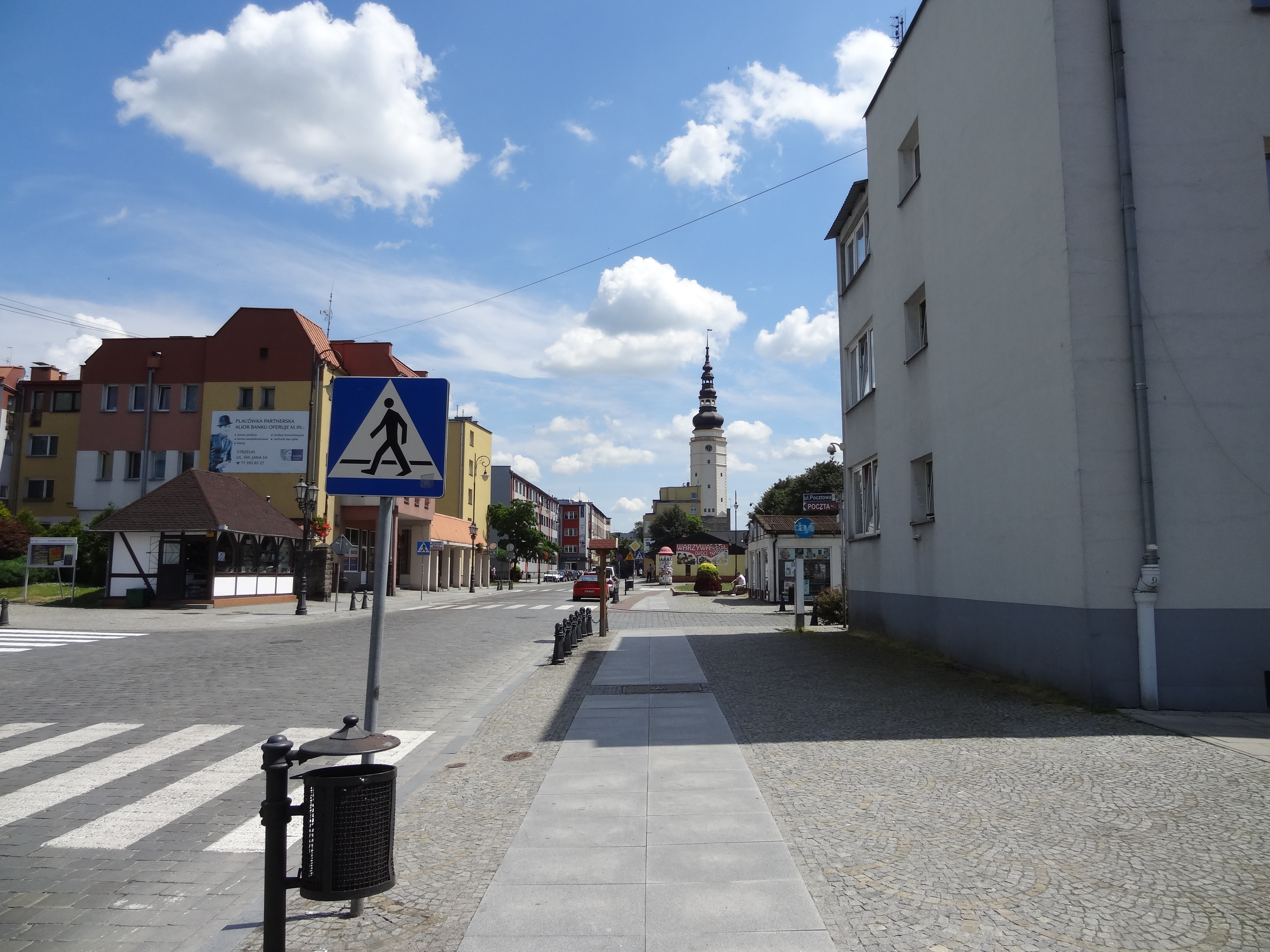 ul. Kościuszki w Strzelinie (widok na ratusz)